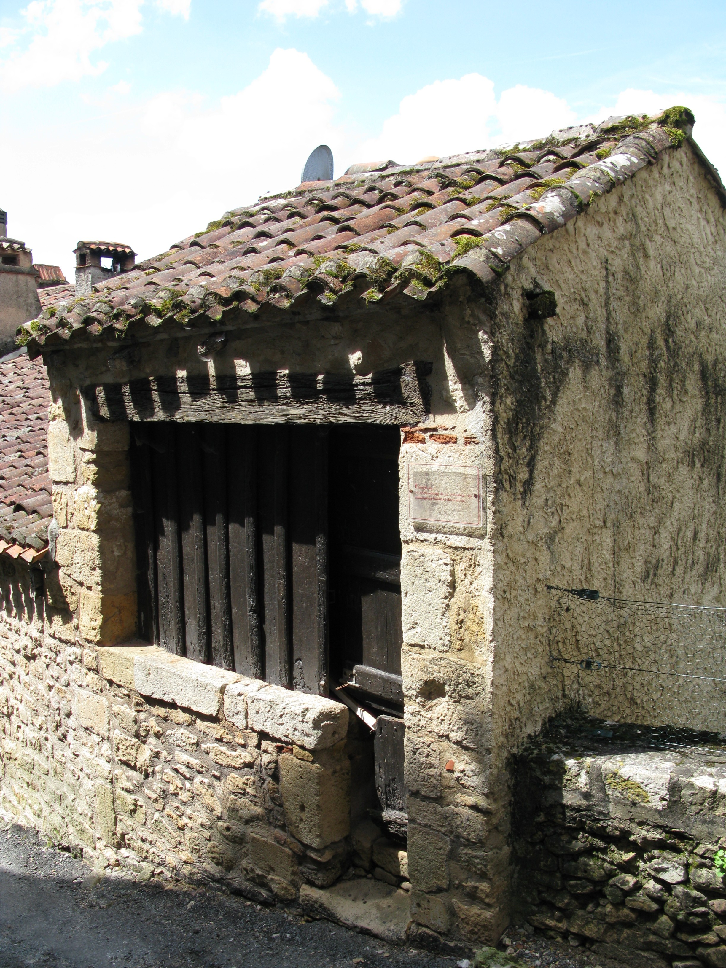 "Échoppe du tisserand", fin XIVe siècle à Limeuil, Dordogne, France. La porte d'entrée en bois donne sur la pièce destinée à abriter le métier à tisser. Une large ouverture assure l'éclairage indispensable pour travailler. Composée d'un étal en bois pour exposer les marchandises et d'un auvent pour les abriter elle permet au tisserand de surveiller, tout en travaillant, à la fois son étal et la rue pour interpeller le chaland et engager la conversation avec lui, quand l'occasion se présente. L'acheteur ne pénétrait jamais dans une échoppe mais se tenait pendant toute la durée de la négociation devant l'étal où l'artisan pouvait éventuellement venir le rejoindre.